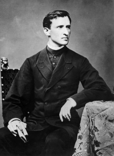 Theodor Ortvay als junger Mann (Zeitgenössische Fotografie); Karpatendeutsches Kulturwerk (KDKW) Karlsruhe